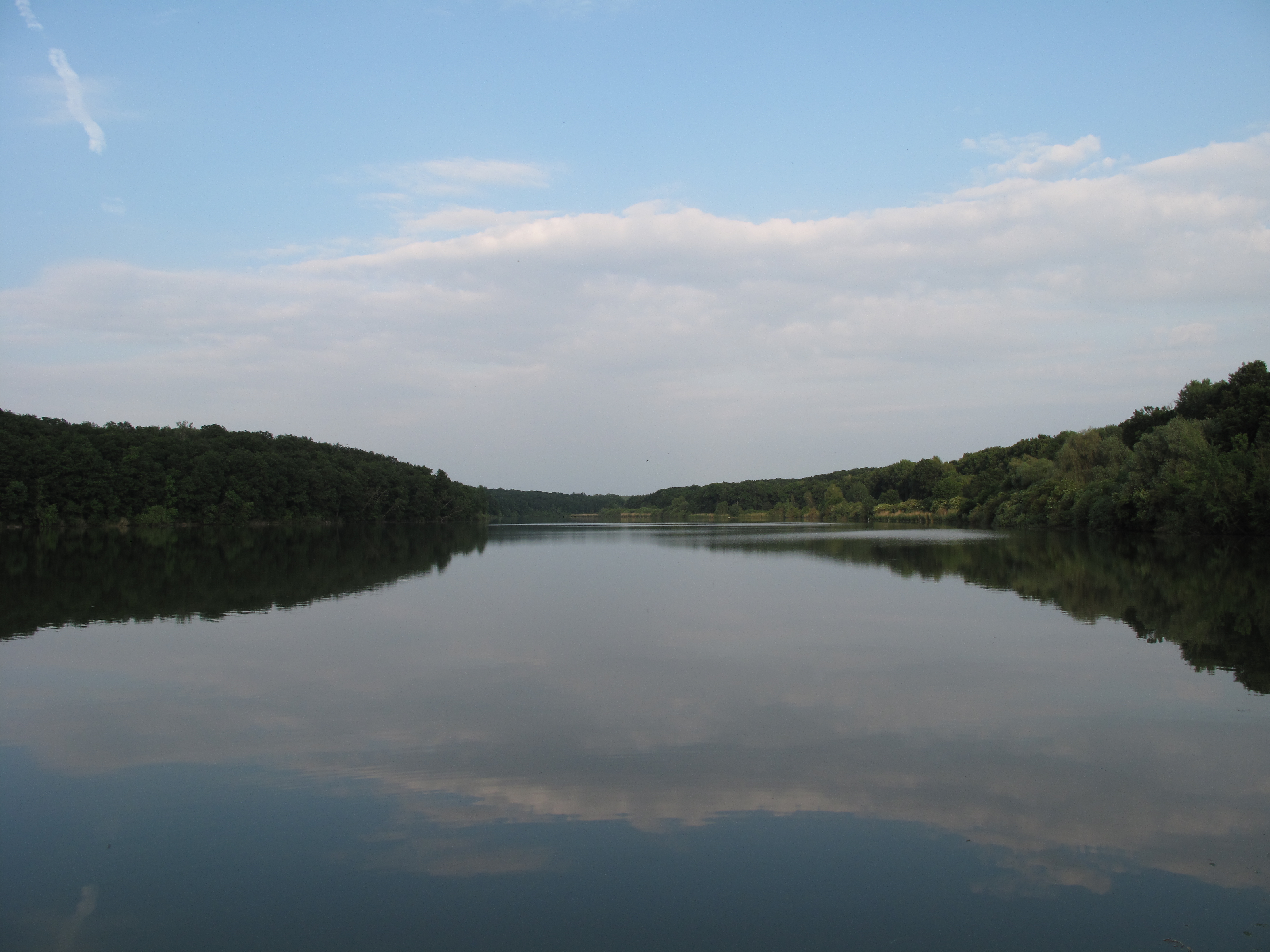 Vodní hladina Jakubského rybníka. Okres Nymburk, Česká republika.